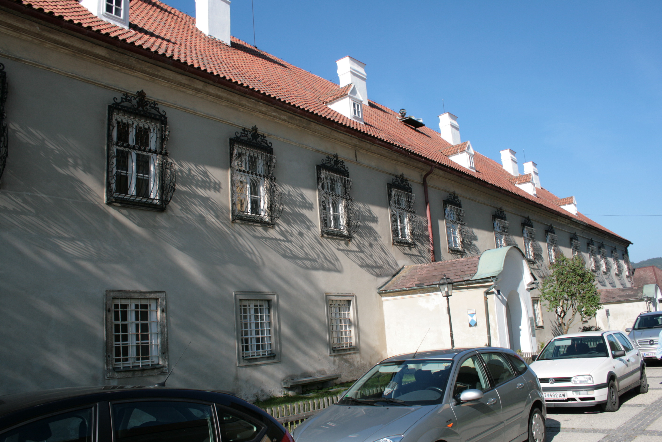 Pfarrhof und Kuratenhaus